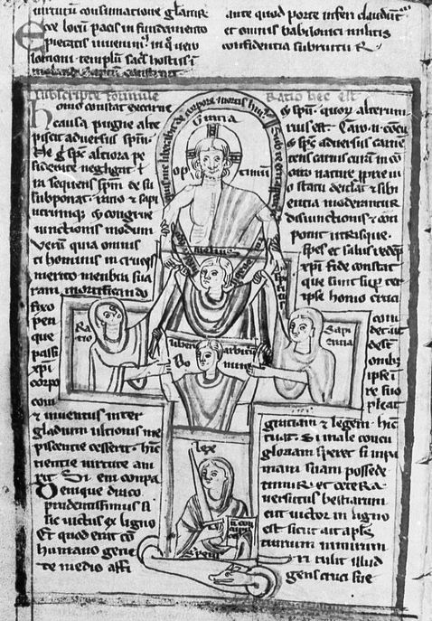 [Peregrinus Hirsaugiensis:] Schaubild Homo constat ex carne. Darmstadt ULB Hs. 815, Bl. 37v